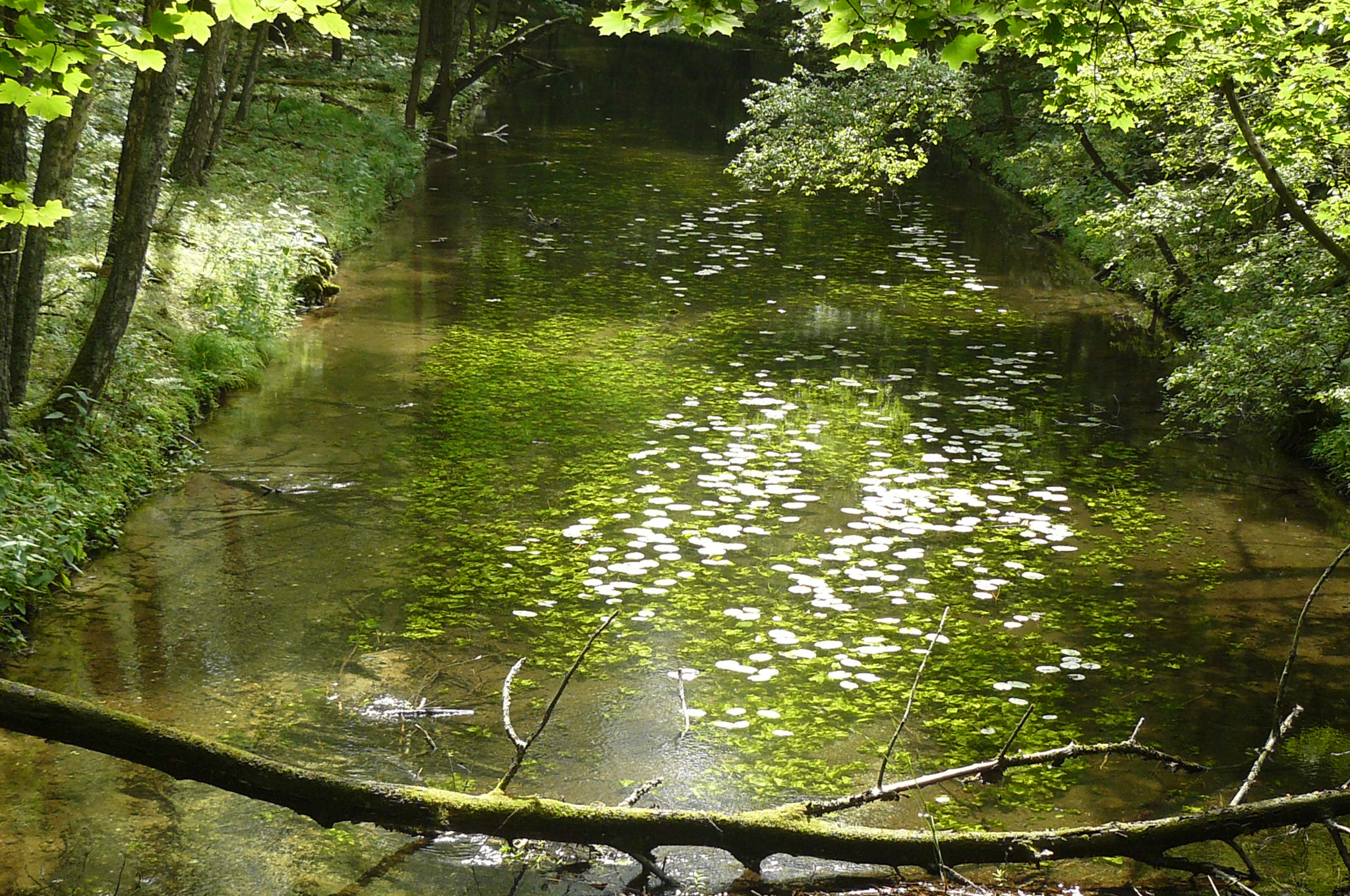 Kanał Głuchy koło jez. Ostrowiec.